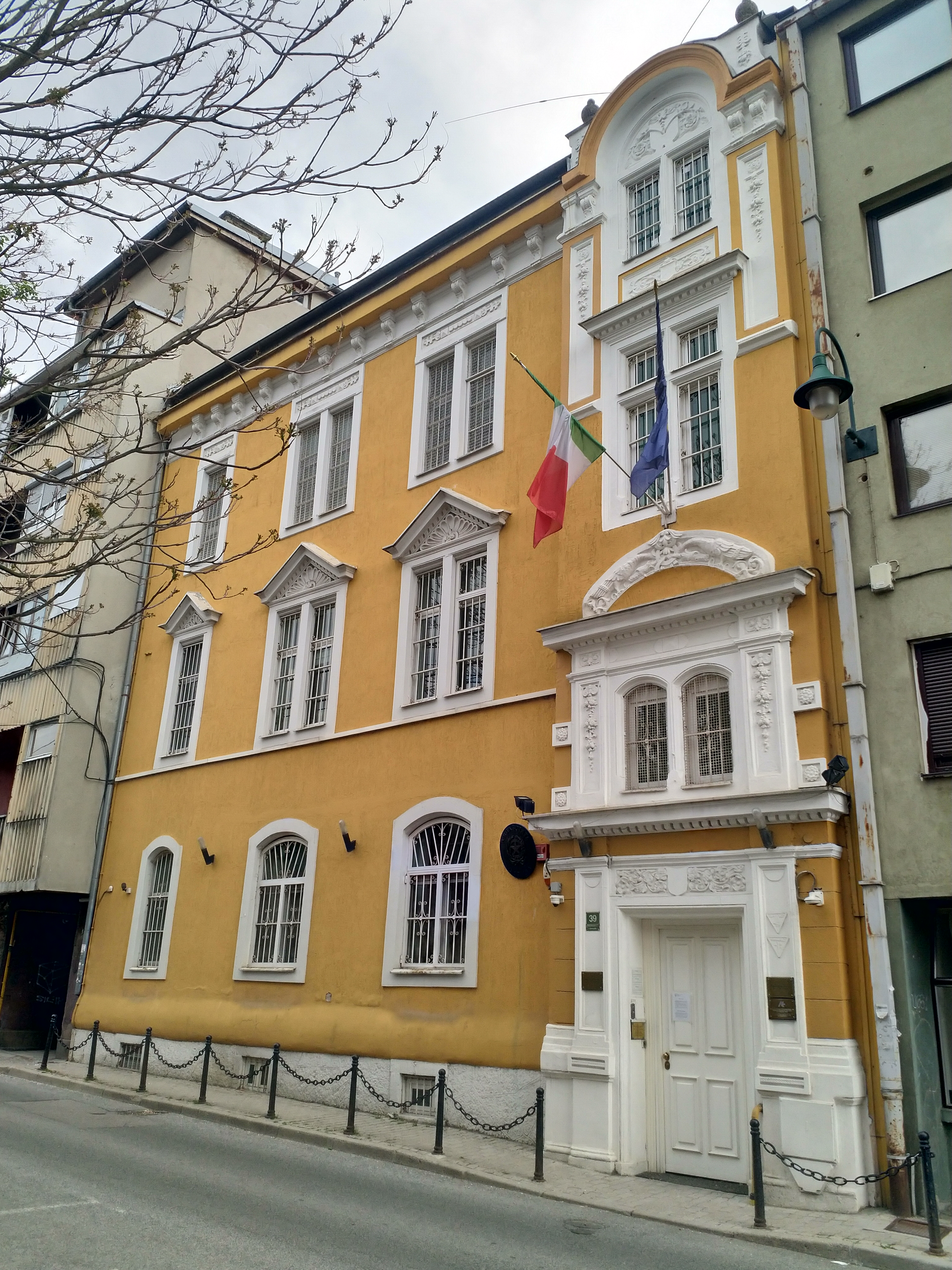 Ambasada Italije u Sarajevu